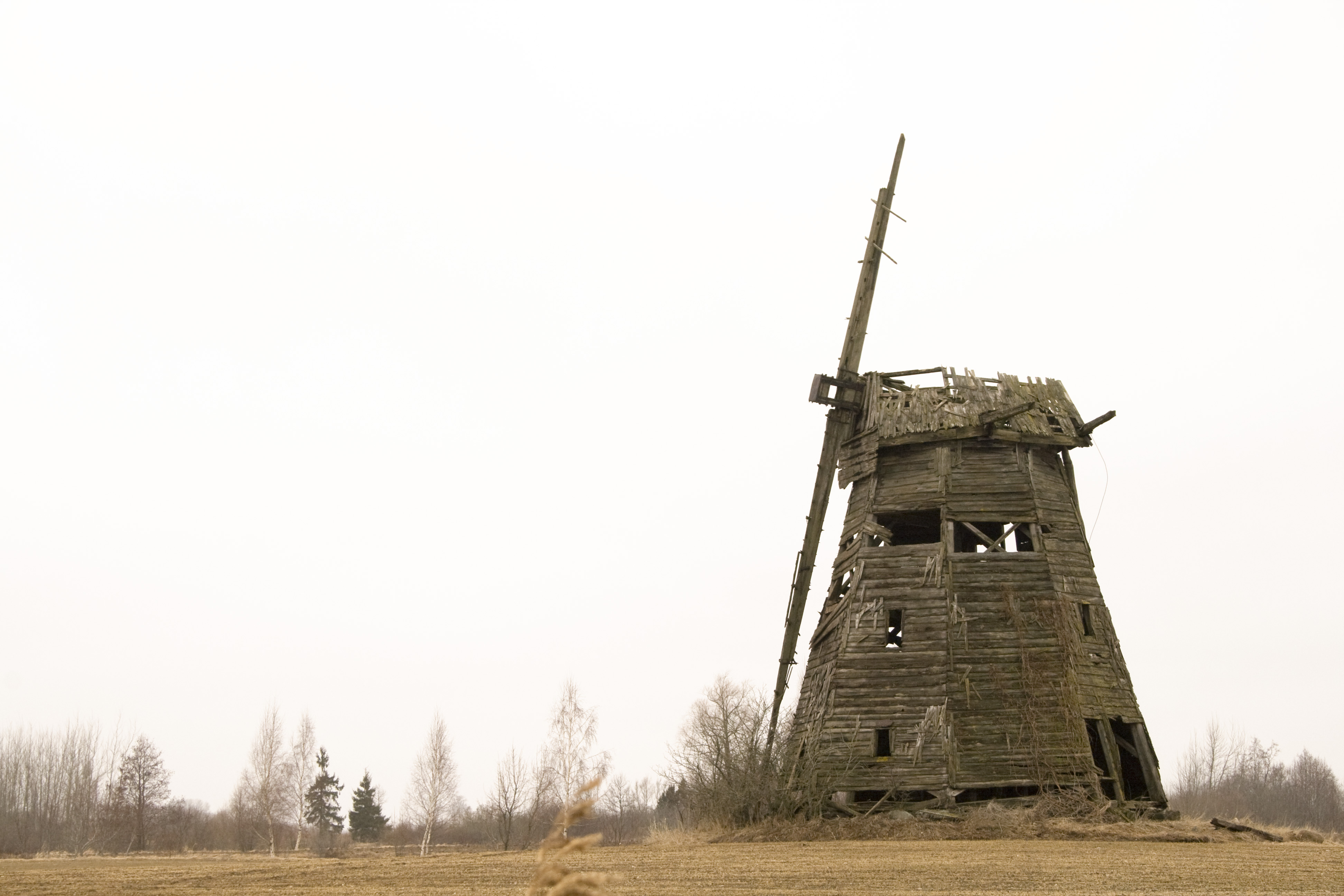 Wind mill